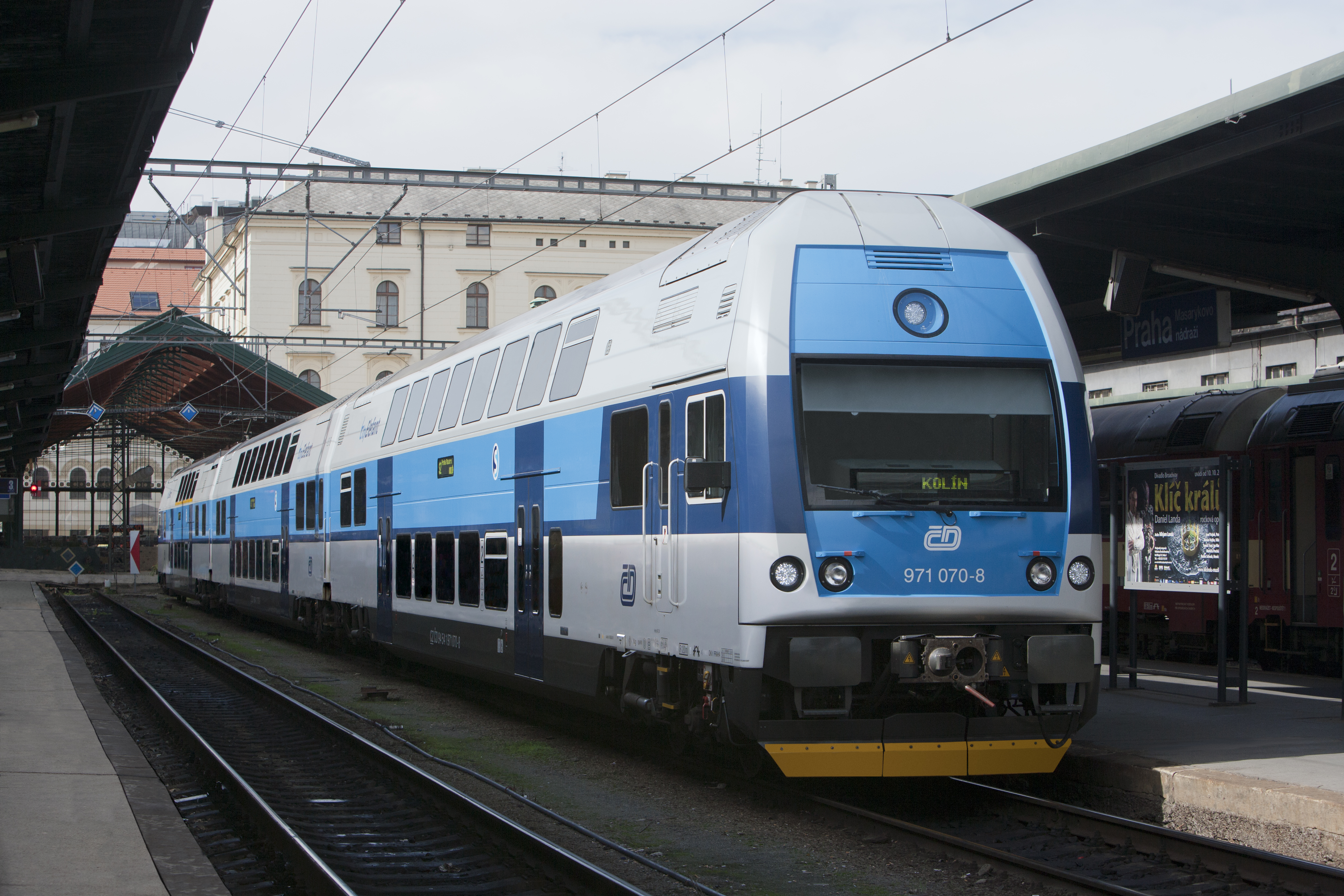 Dvoupodlažní elektrická jednotka nové generace, která do příměstského provozu přinesla moderní, pohodlné a bezpečné cestování (foto ze stanice Praha Masarykovo nádraží)